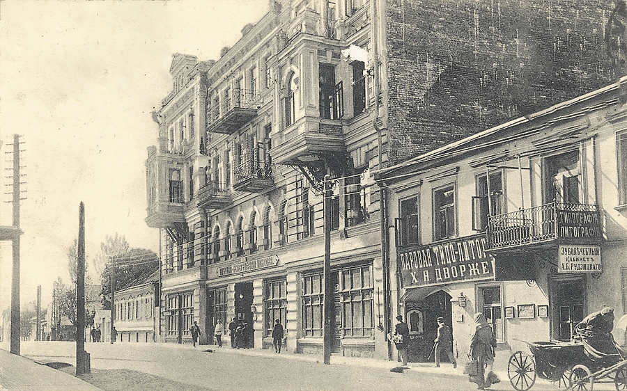 Беларуская (тарашкевіца): Менск (Miensk), вуліца Францішканская (vulica Franciškanskaja). Пошта